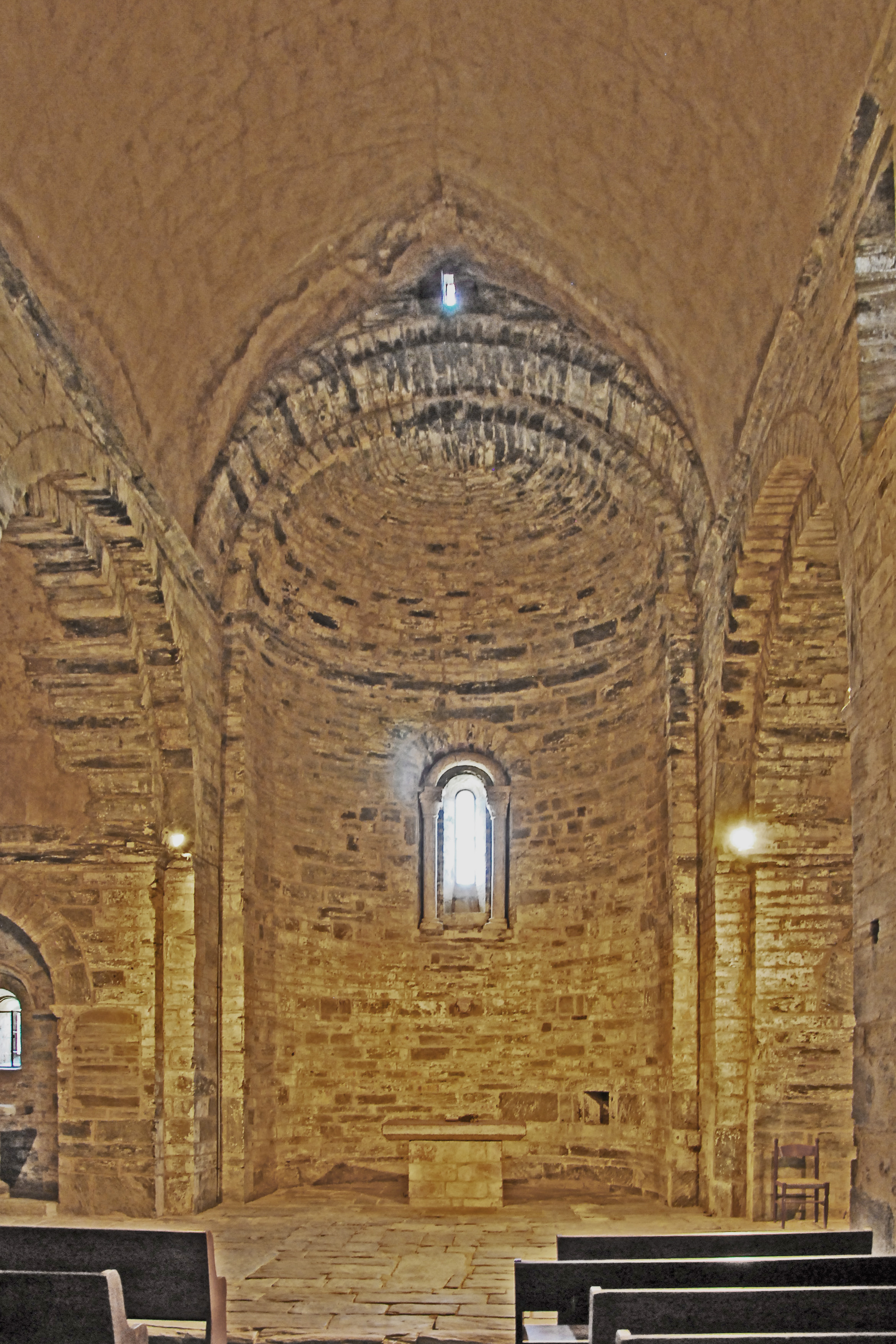 Serrabone, Chorhaupt aus Schiff